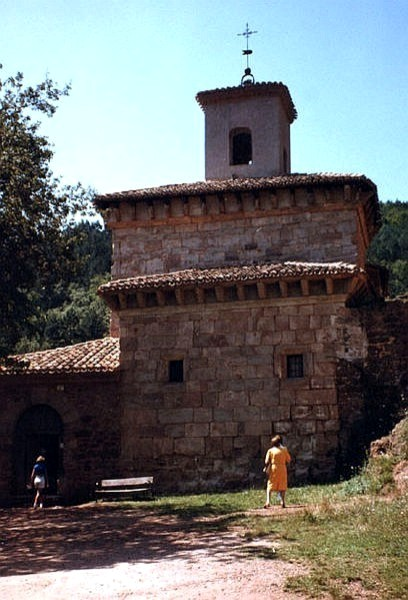 vient de Autor: Rafaelji Tomada: 16-8-1997 Negativo DA-5 KODAK